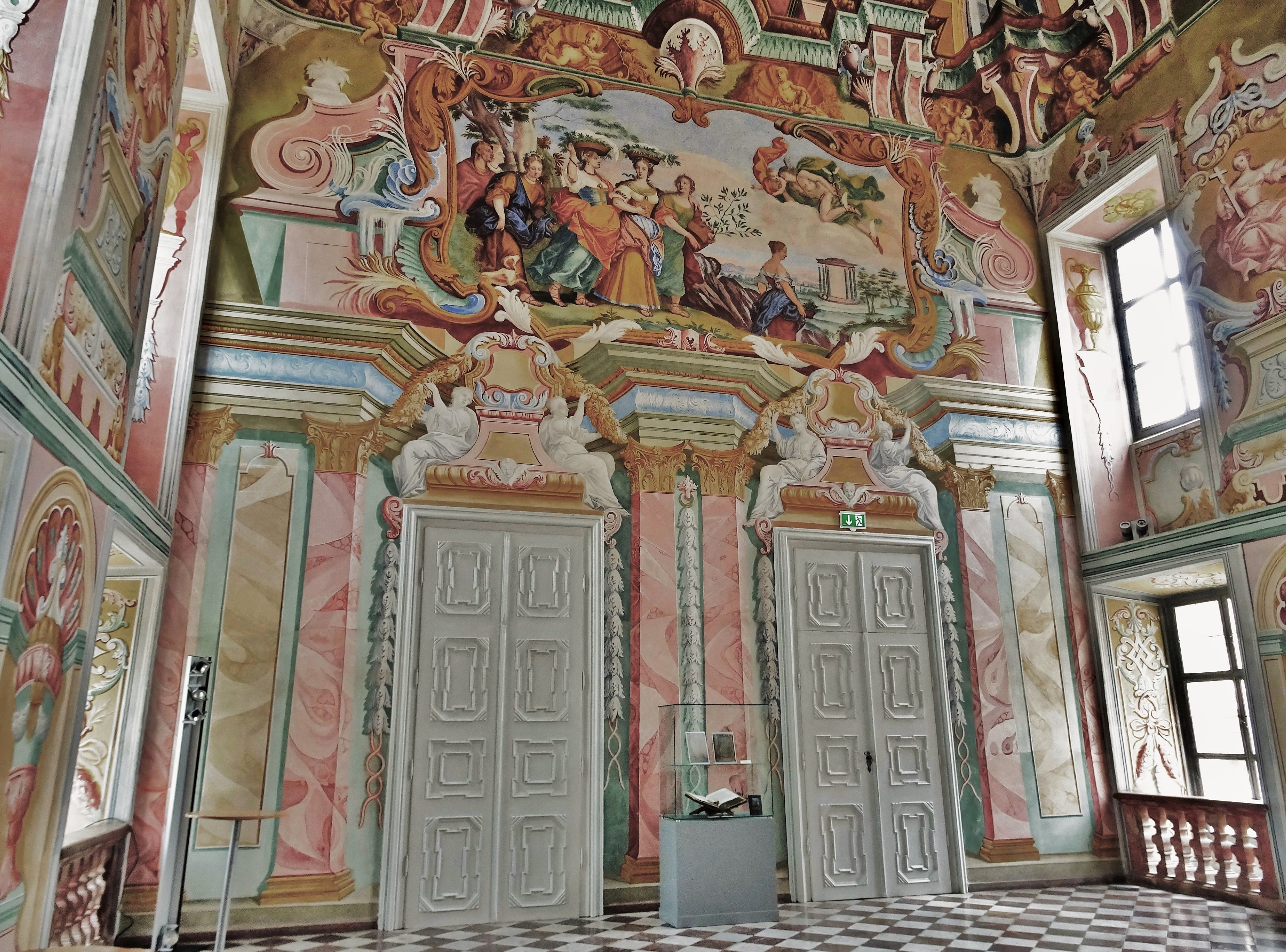 Stift Rein, der Huldigungssaal